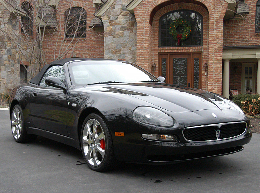 Maserati 2004 Spyder